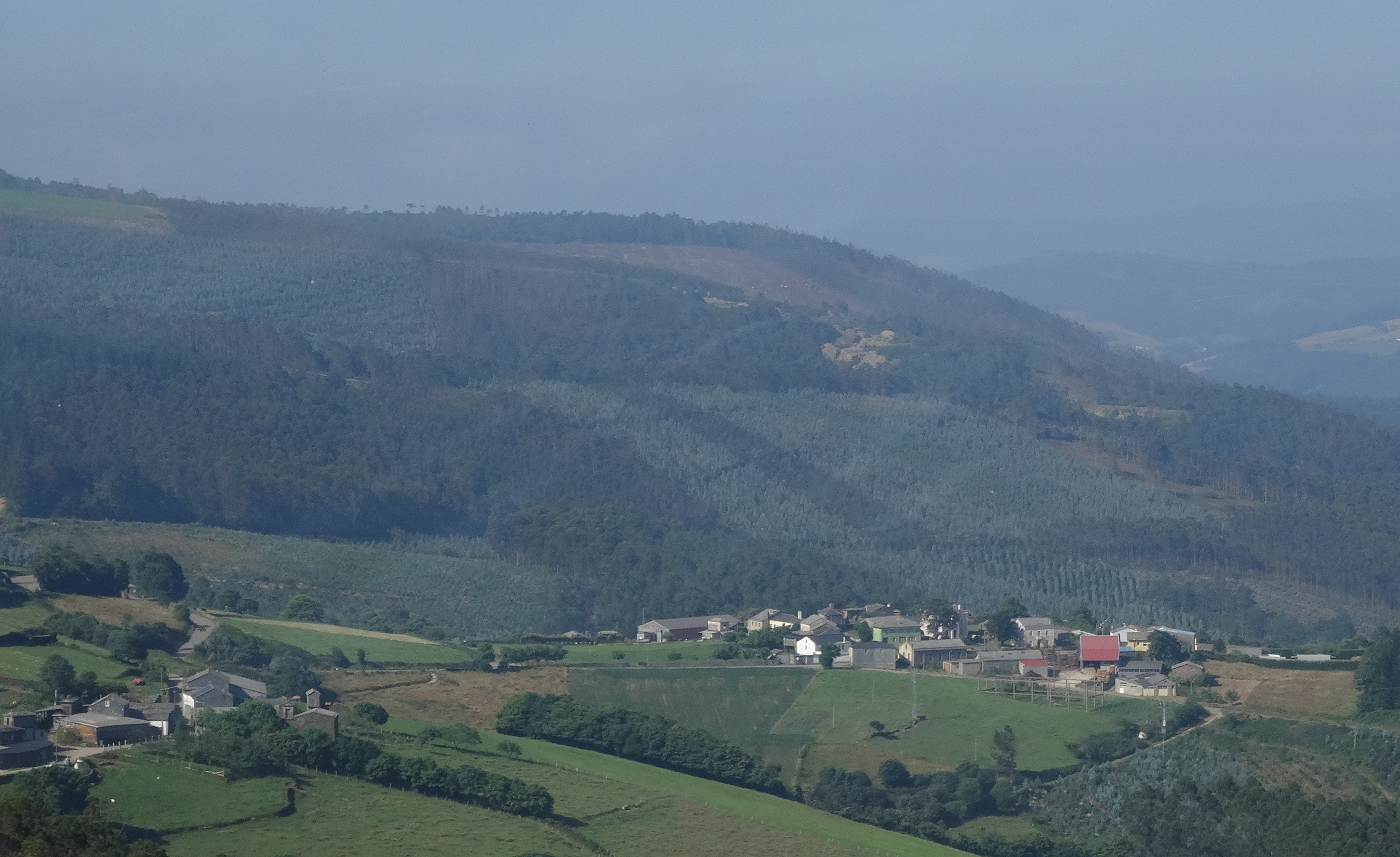 Ver título.